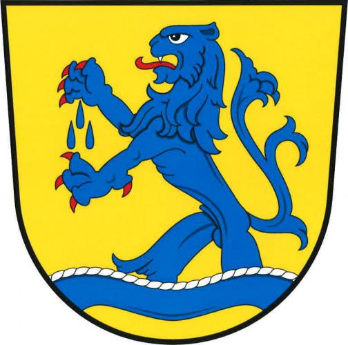 znak, Prodašice, okres Mladá Boleslav